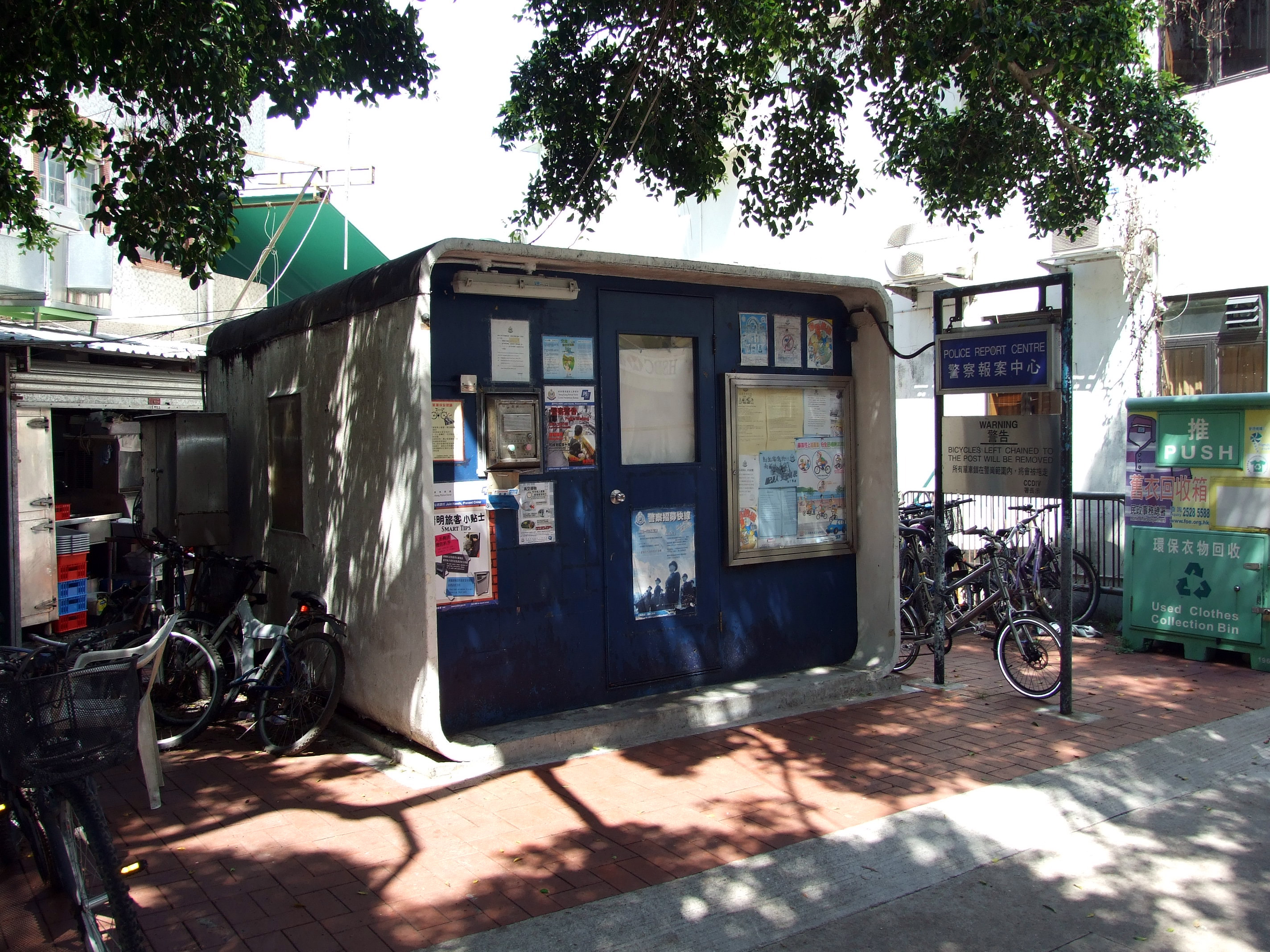 中文（香港）: 榕樹灣報案中心